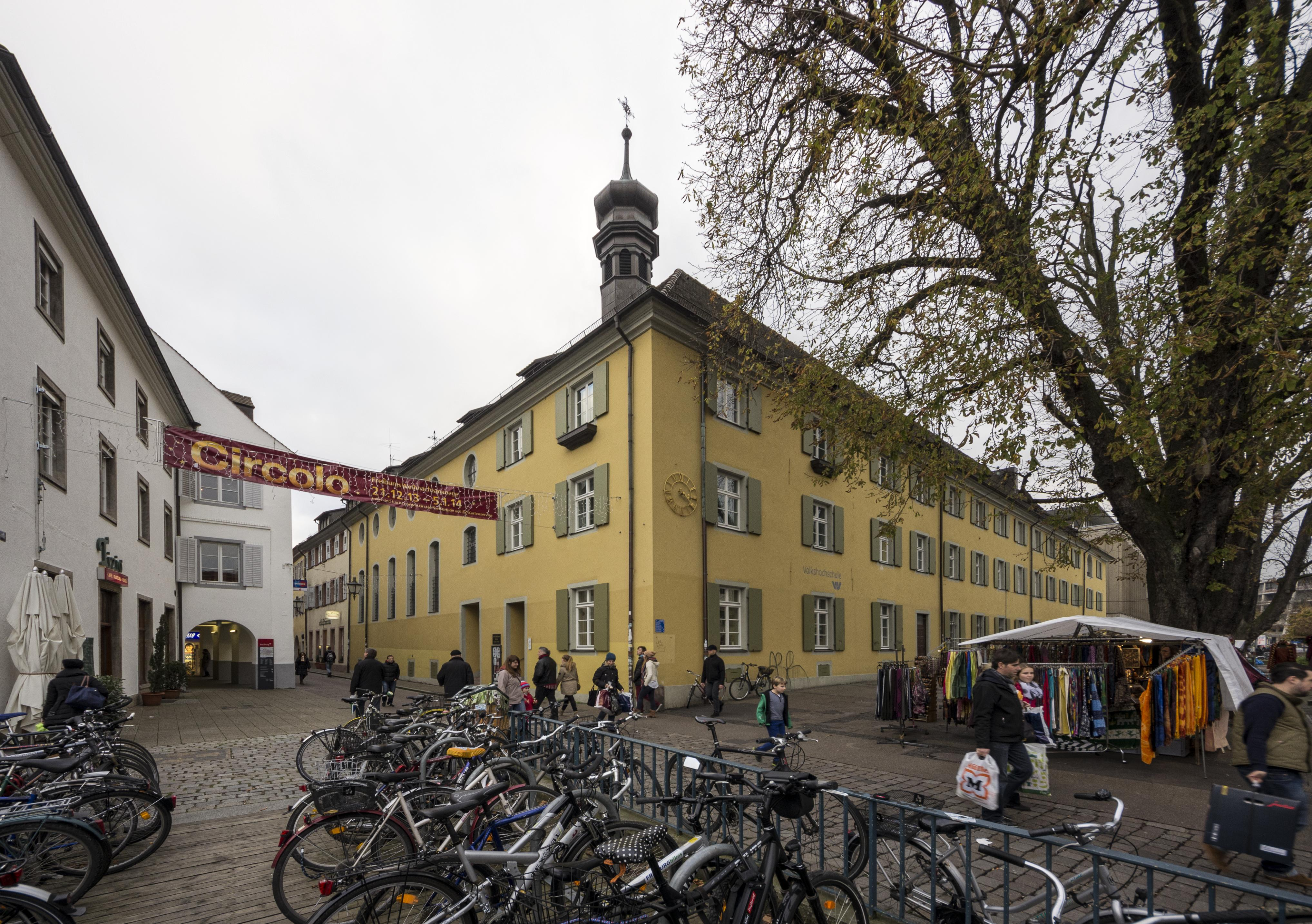 Gebäude in Freiburg im Breisgau